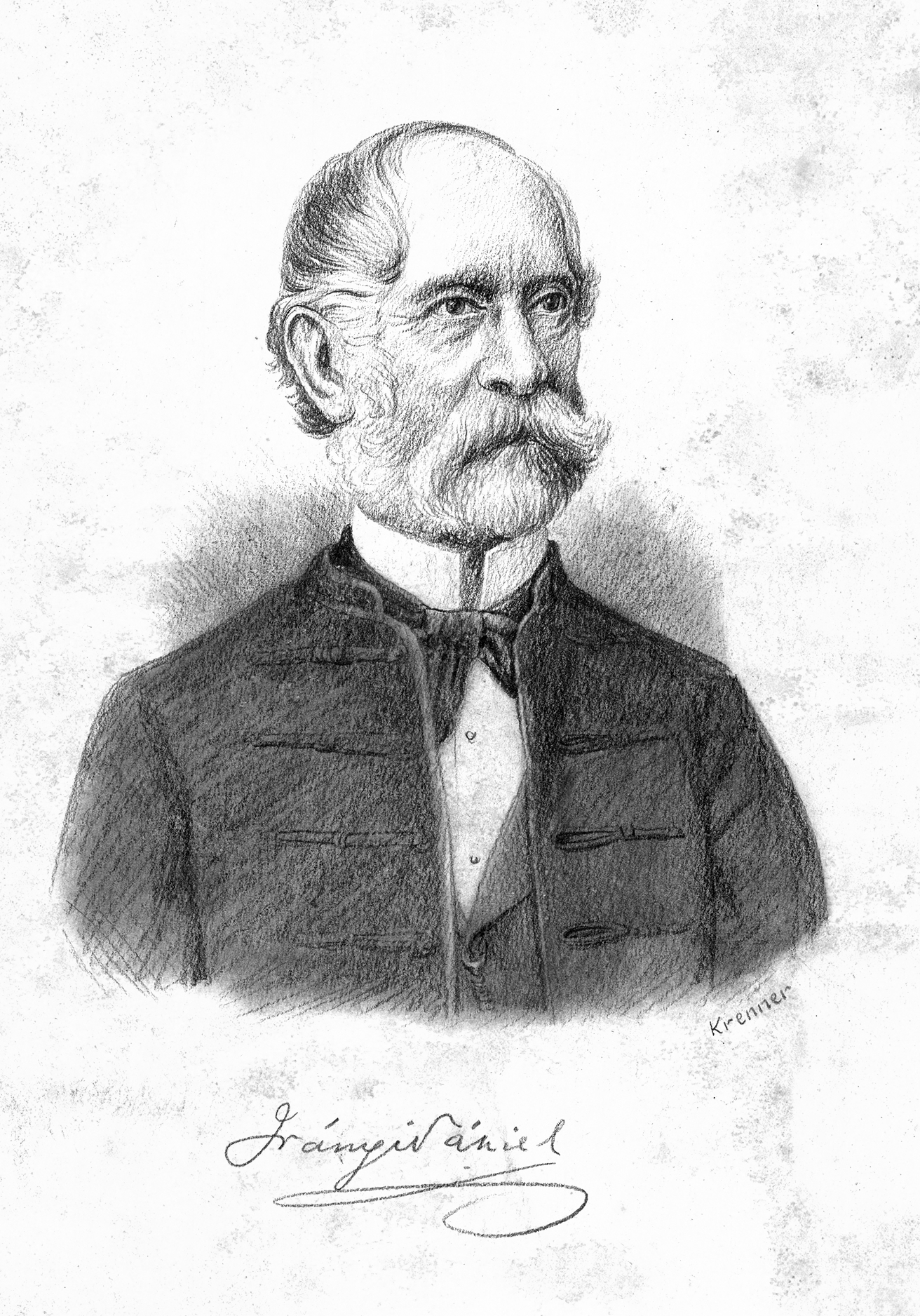 Irányi Dániel (született Halbschuh Dániel, Toporc, 1822. február 24. – Nyíregyháza, 1892. november 2.) politikus, publicista.